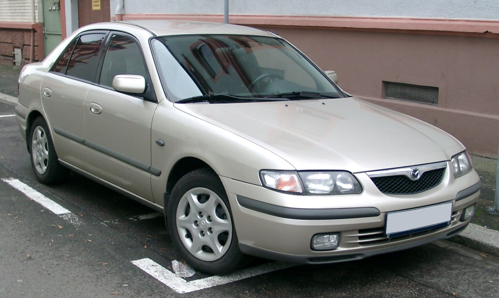 Mazda 626, 5. Generation